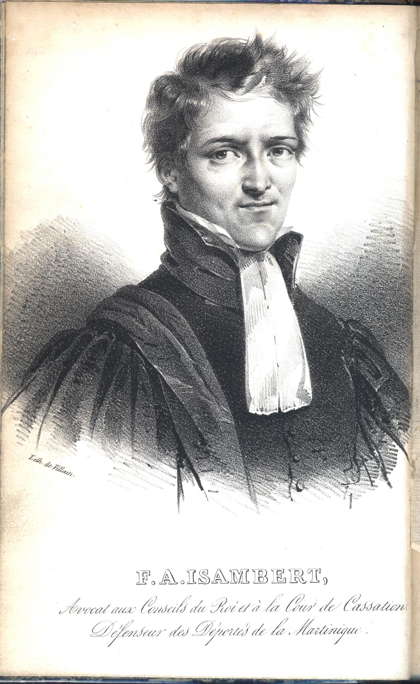 portrait de François-André Isambert